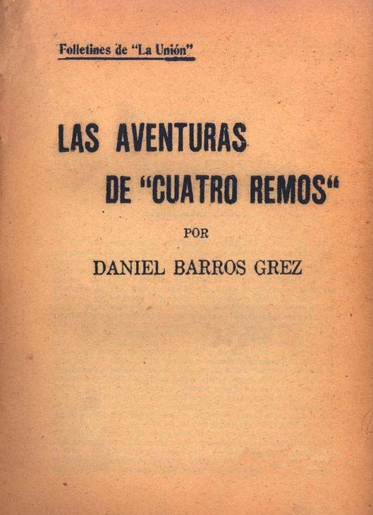 Las aventuras de "Cuatro remos" / por Daniel Barros Grez. -- [Santiago] : Impr. La Unión, 1921. 4 v. ; 20 cm.